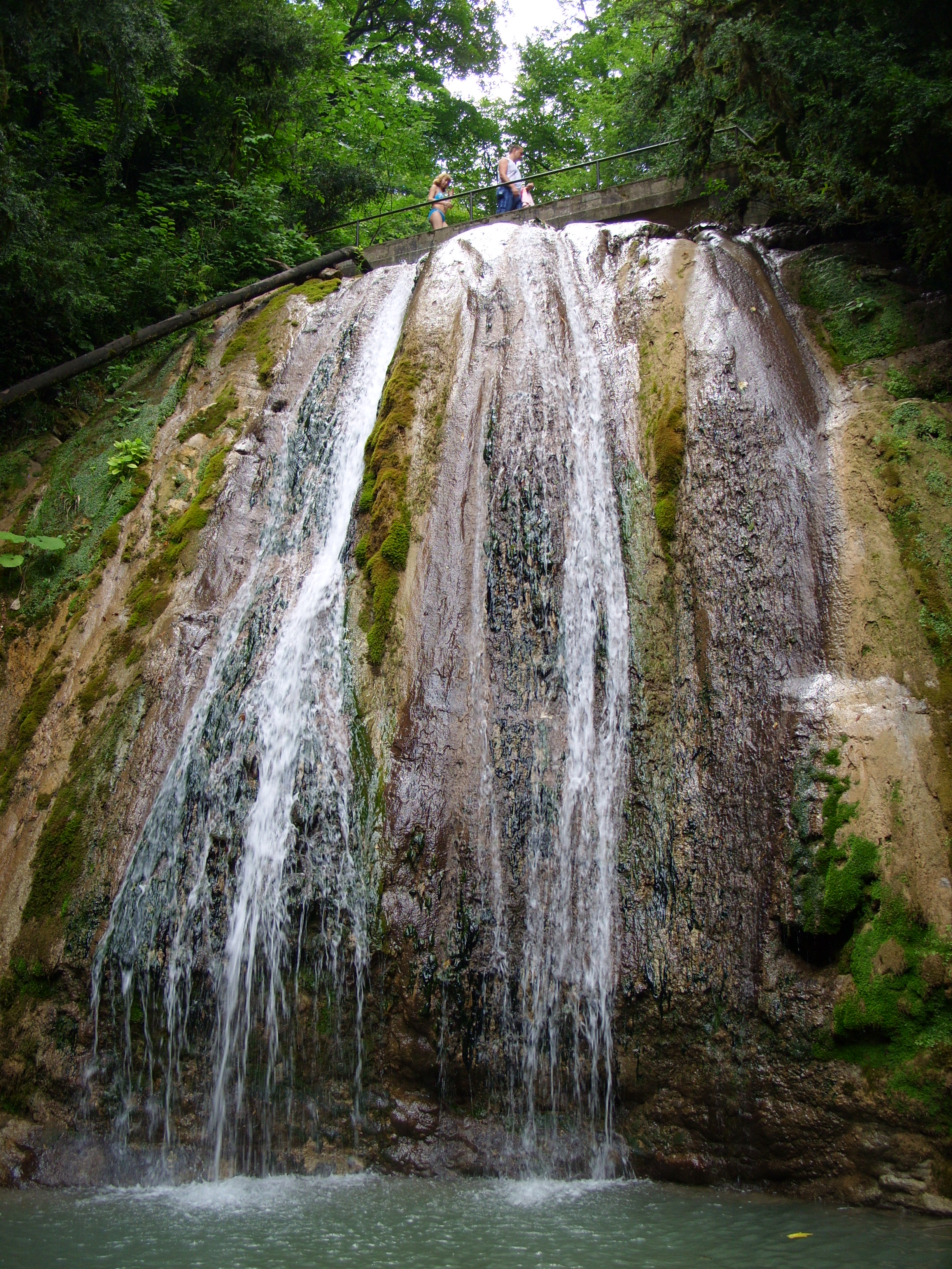 снимок июля 2009 г., Кичмайский сельский округ, Лазаревский район Сочи